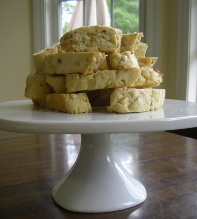 Pinoli (pine nuts) cookies